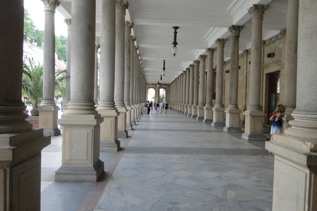 Питьевая галерея. Карловы Вары